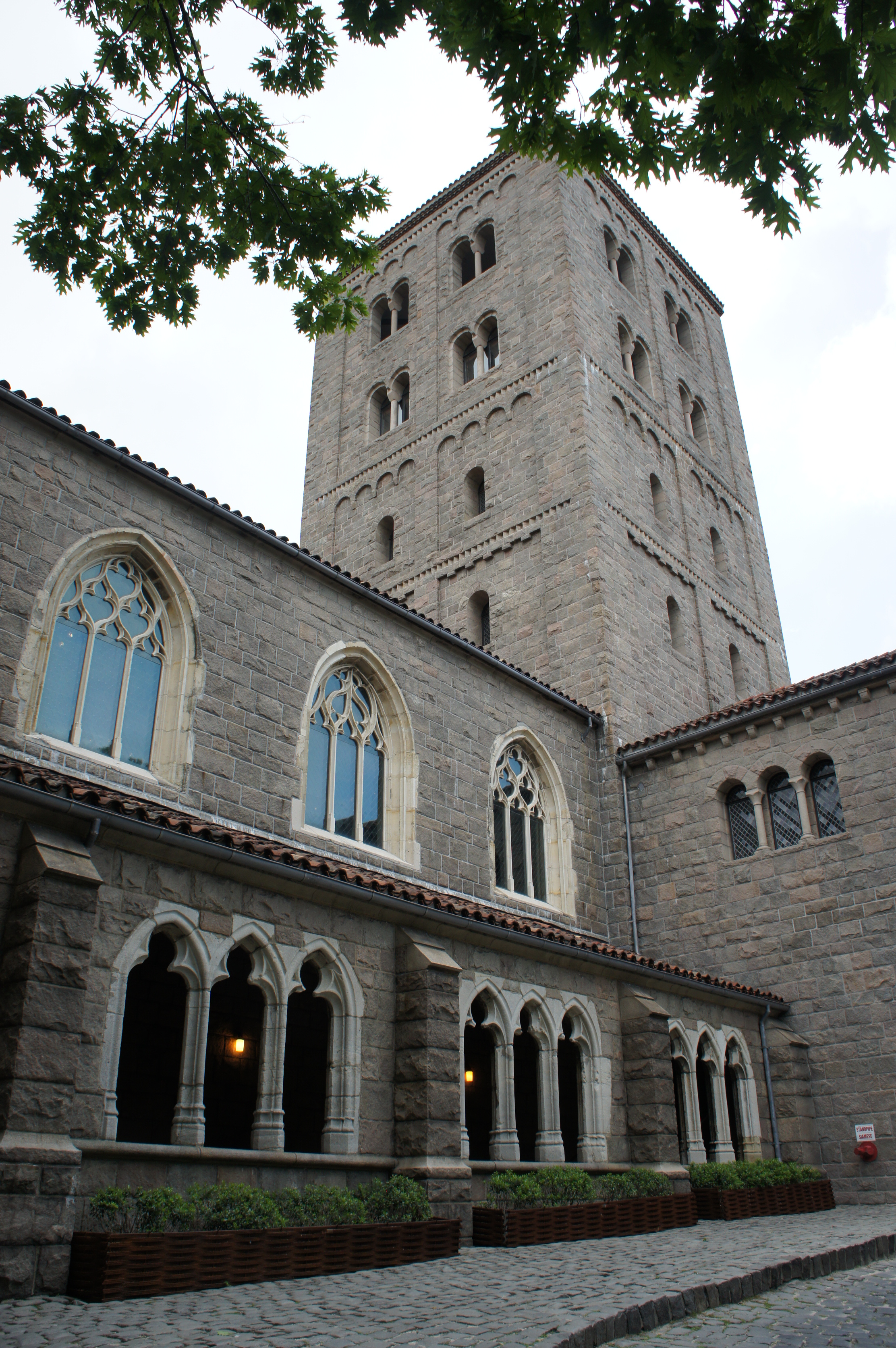 arcade de Froville 4